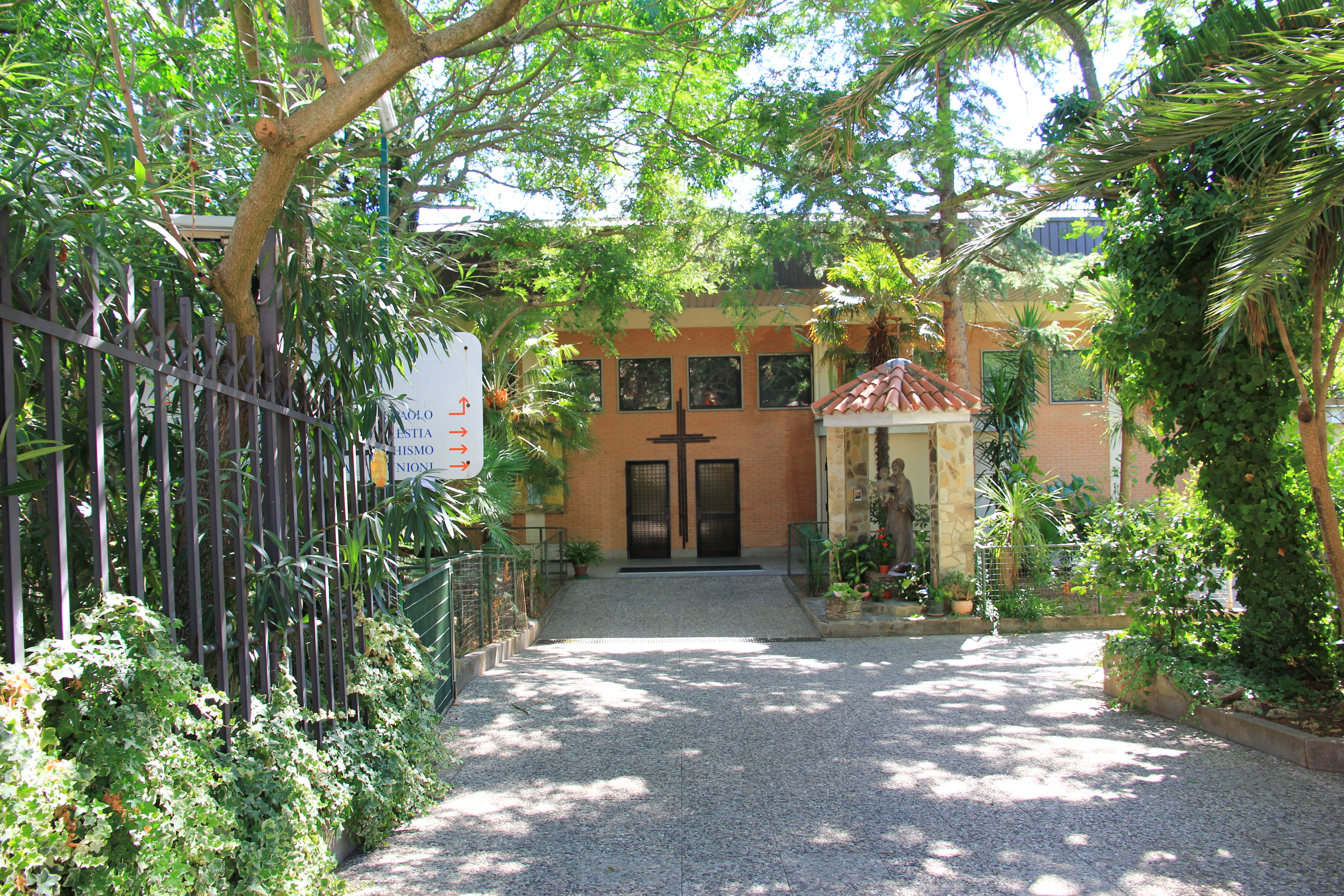 Sassari